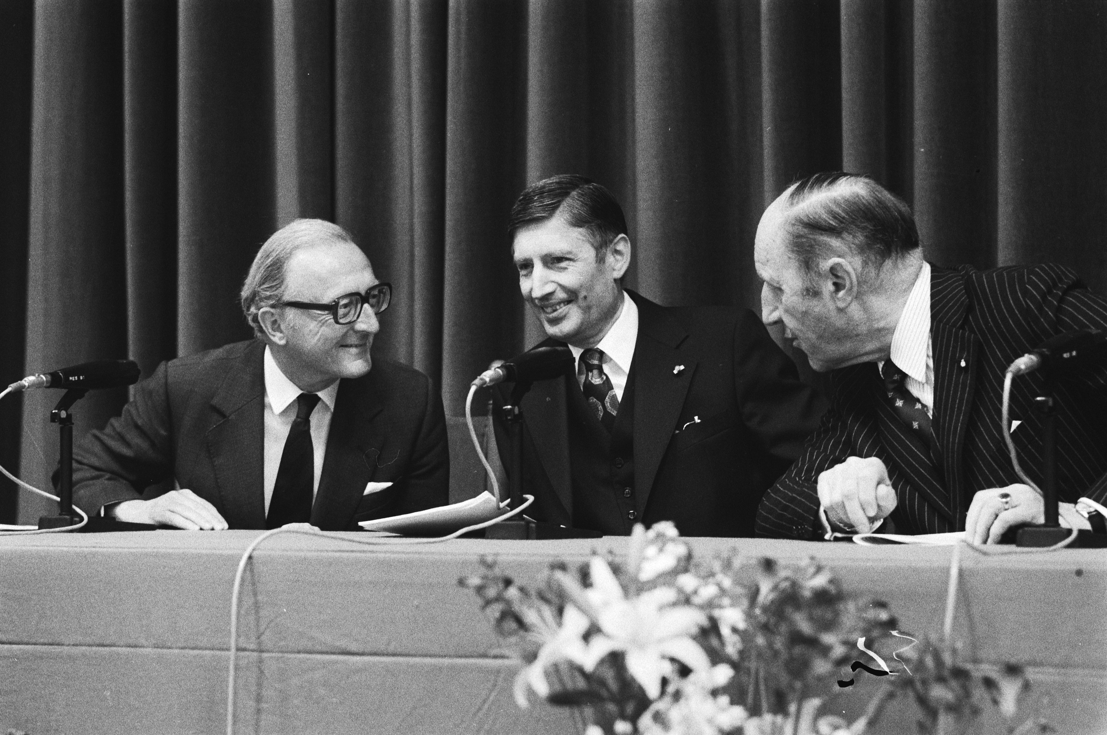 Collectie / Archief : Fotocollectie Anefo Reportage / Serie : Openingsceremonie van de NAVO Ministerraad 1979 in de Ridderzaal in Den Haag Beschrijving : V.l.n.r. Lord Carrington, premier van Agt en secretaris-generaal Luns Datum : 30 mei 1979 Locatie : Den Haag, Zuid-Holland Trefwoorden : ministers, ministers-presidenten, secretaissen-generaal, vergaderingen Persoonsnaam : Agt, Dries van, Carrington, Peter, Luns, Joseph Fotograaf : Croes, Rob C. / Anefo Auteursrechthebbende : Nationaal Archief Materiaalsoort : Negatief (zwart/wit) Nummer archiefinventaris : bekijk toegang 2.24.01.05 Bestanddeelnummer : 930-2904